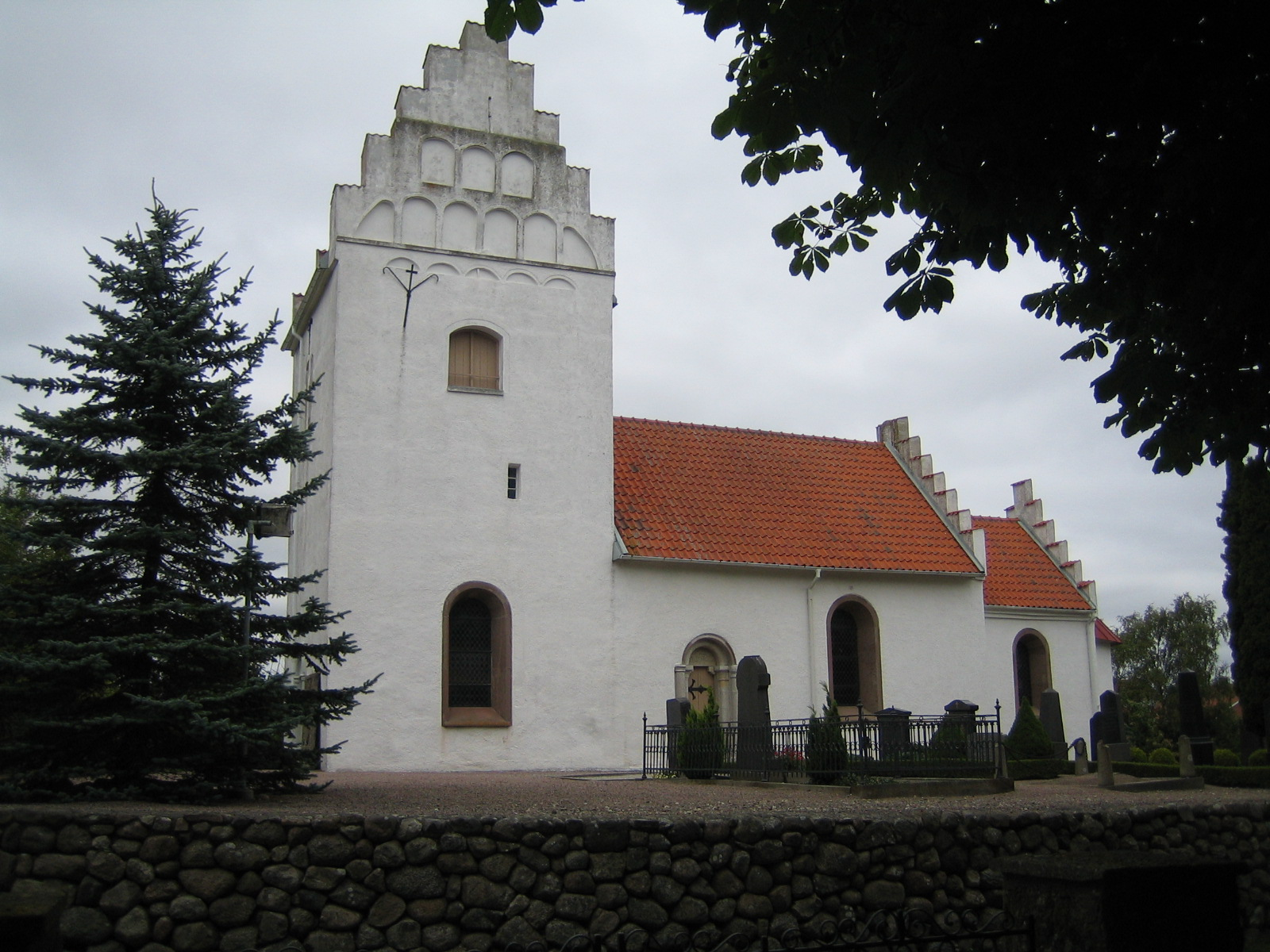 Hedeskoga kyrka